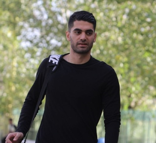 گزارش تصویری تمرین شاگردان استراماچونی پیش از بازی مقابل صنعت نفت آبادان در ۱۲ آبان ۱۳۹۸